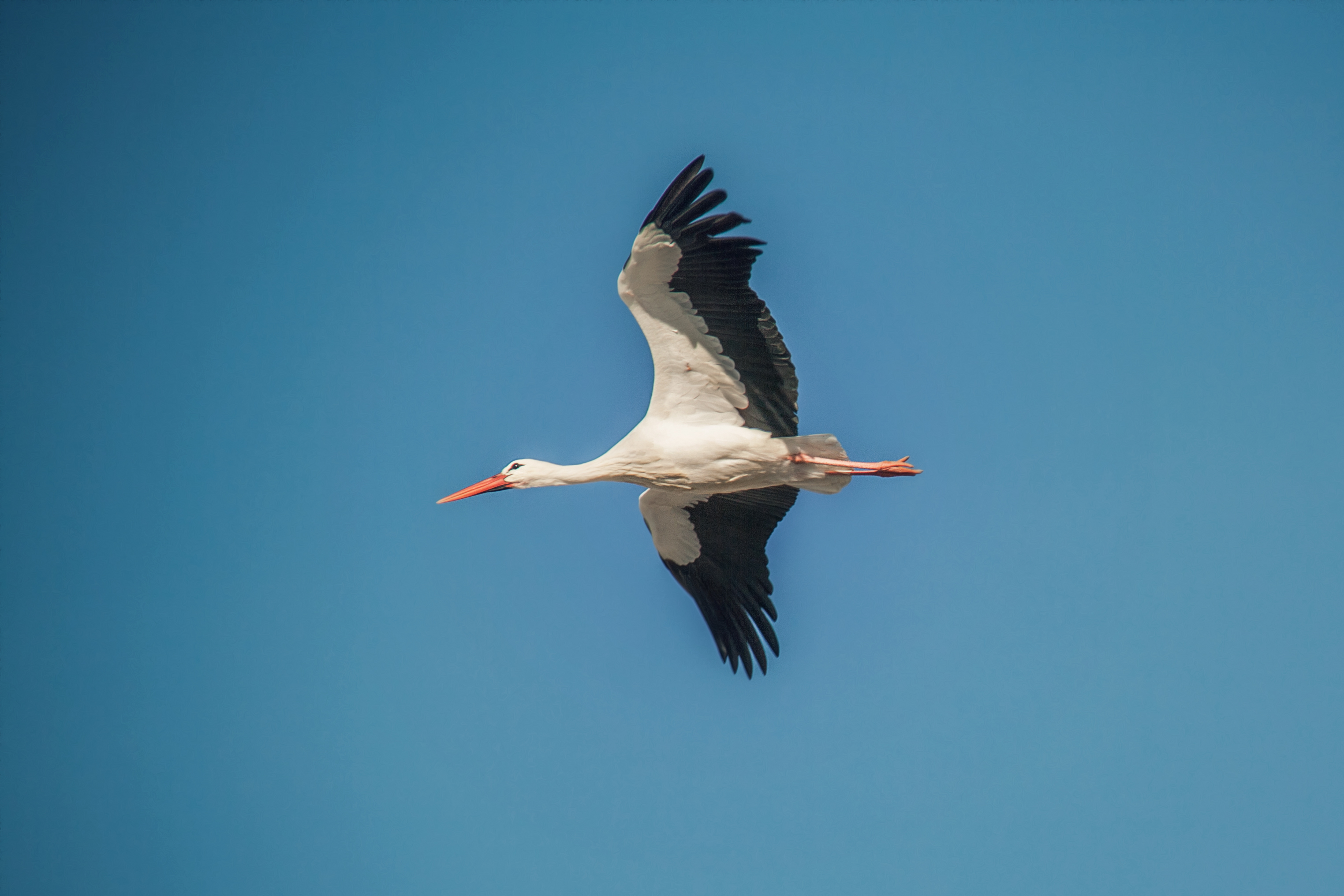 Zaragoza, España